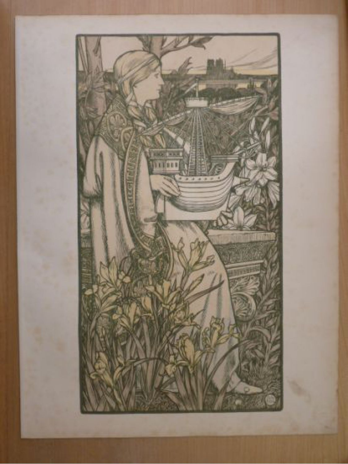 Adolphe Giraldon Lutèce. Lithographie pour L'Estampe Moderne. 1898-1899